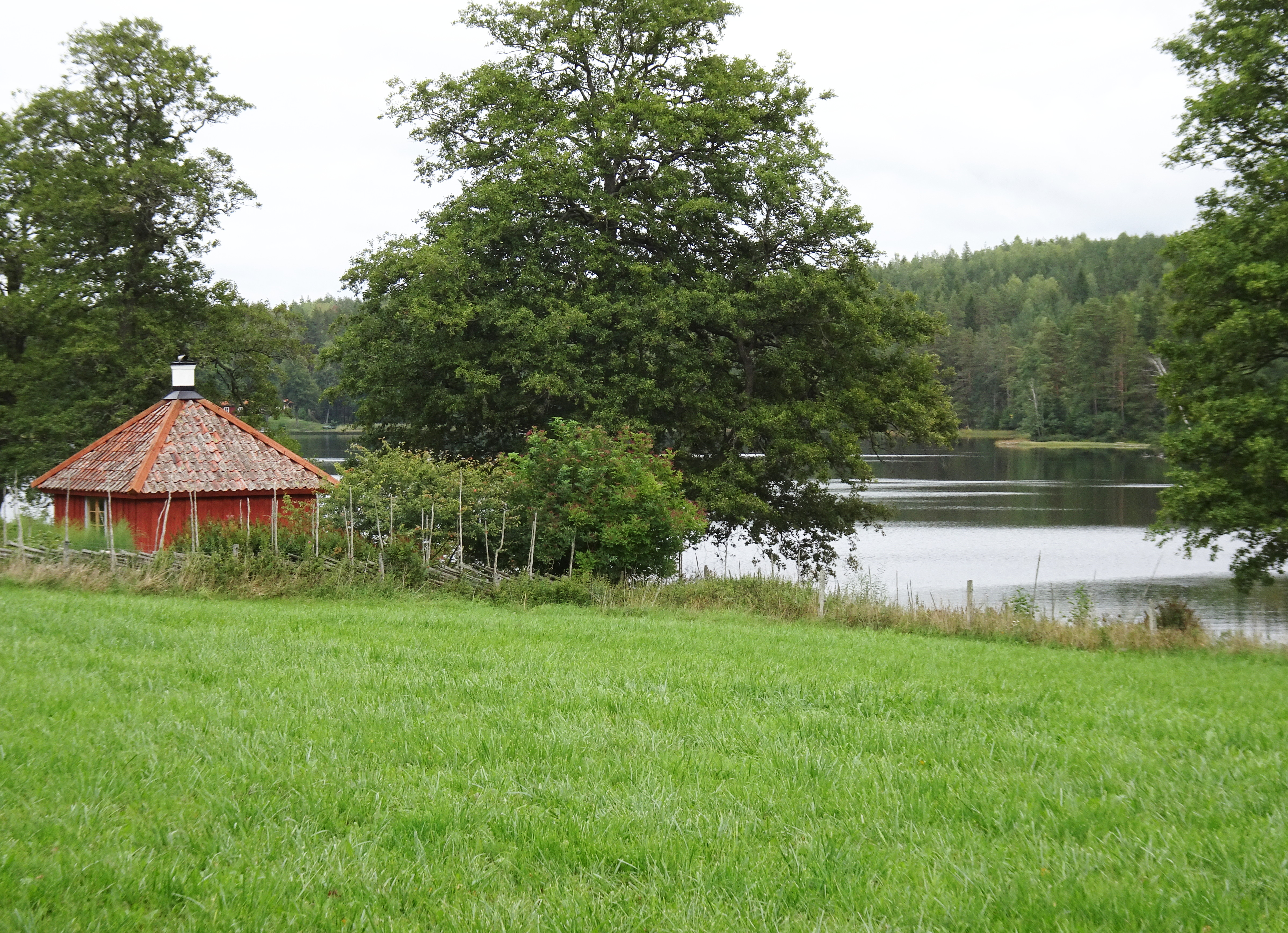 Mora gård med Mora sjön i Flens kommun